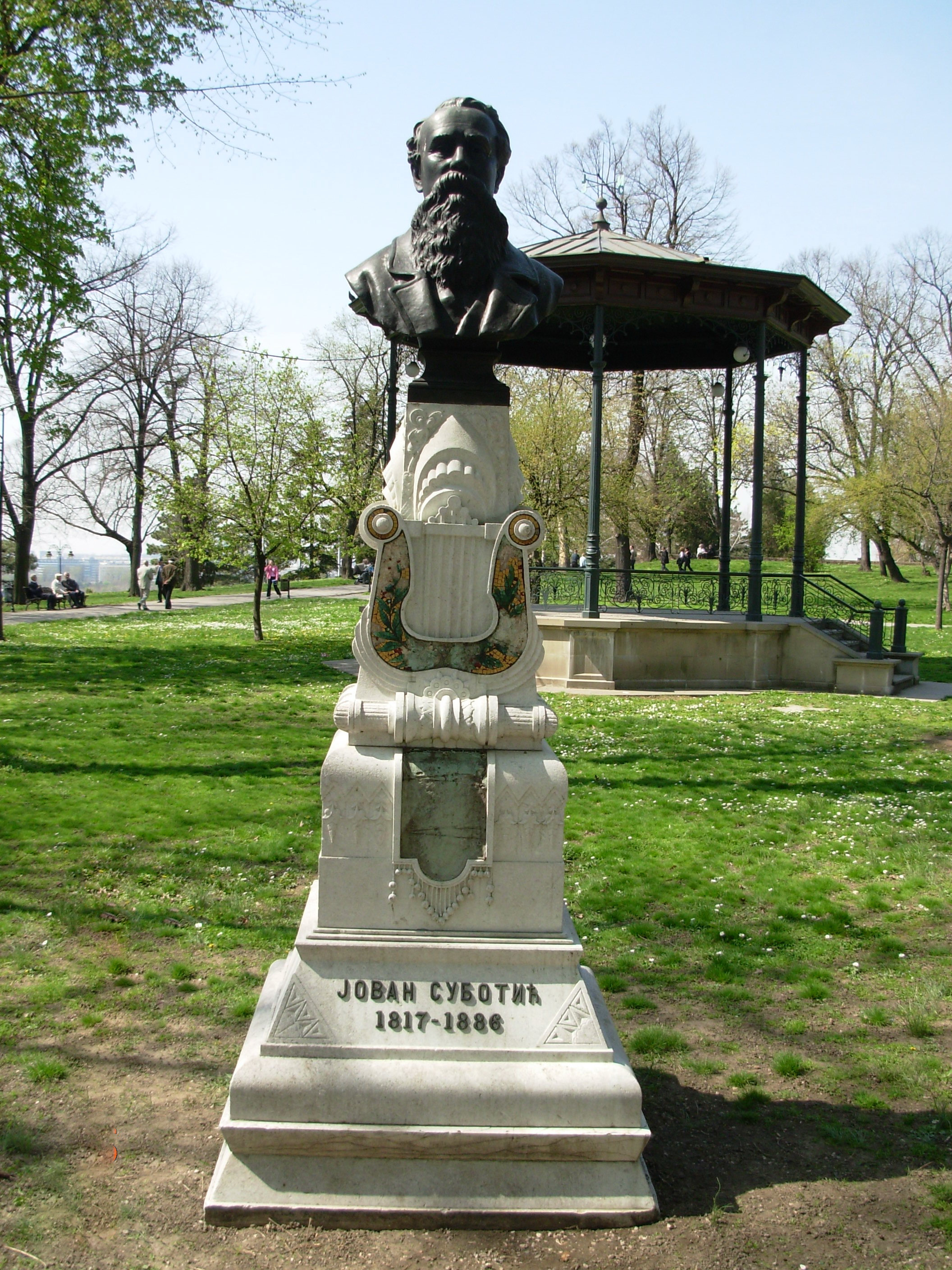 Spomeni Jovanu Subotiću na Kalimegdanu, Beograd. Slikao Goldfinger